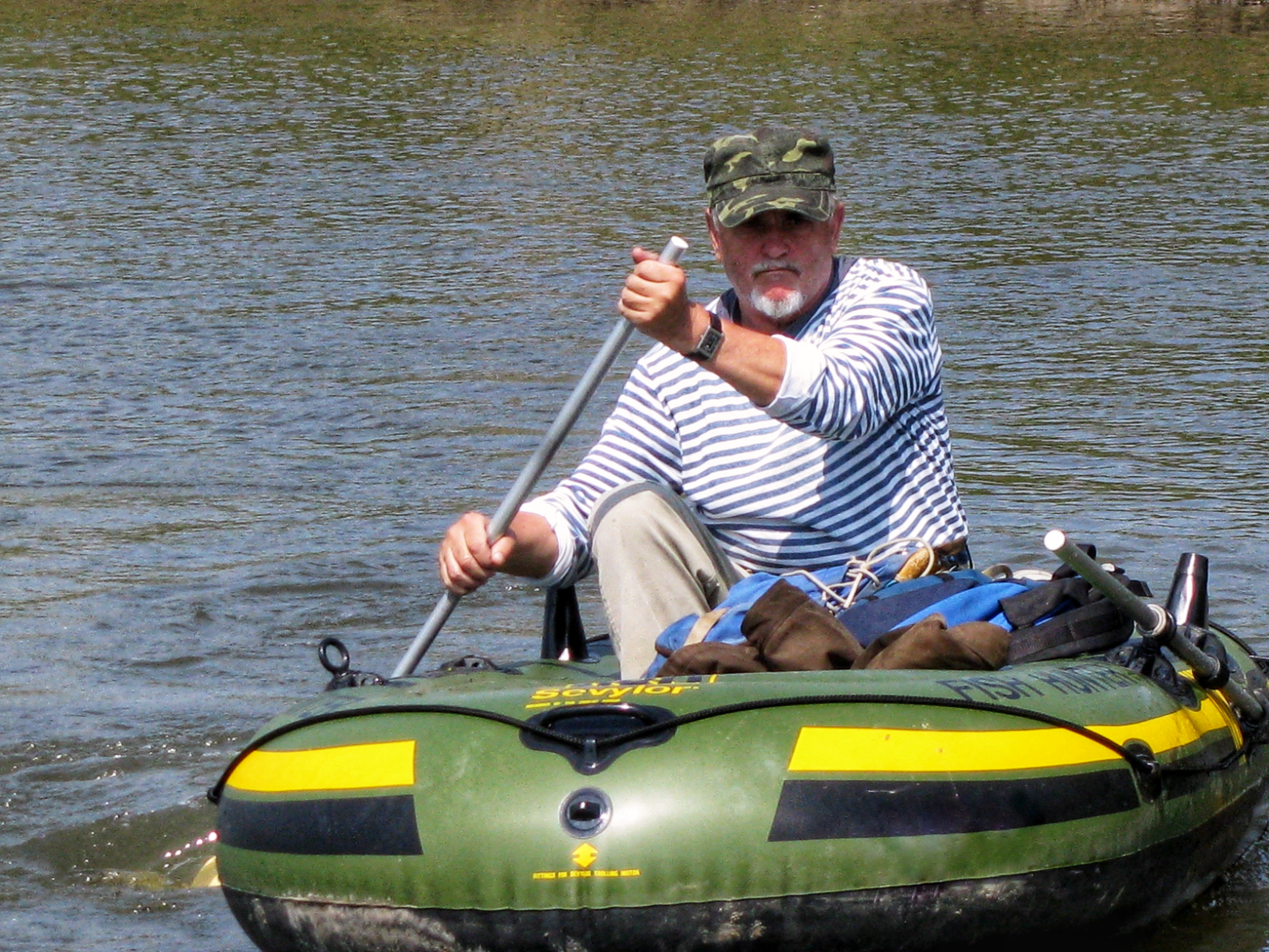 Горинню